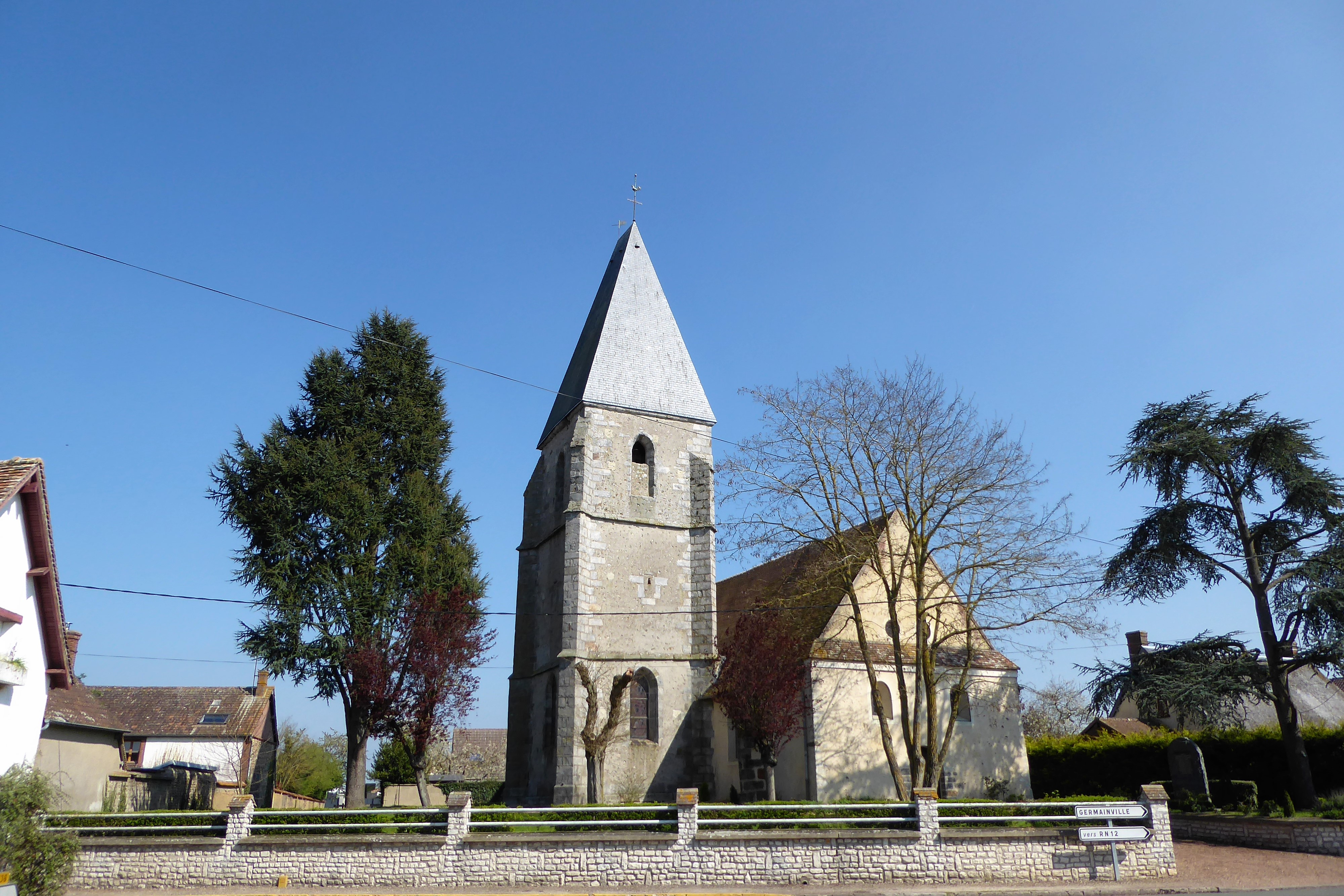 église Saint-Pierre de Serville, Eure-et-Loir, France.